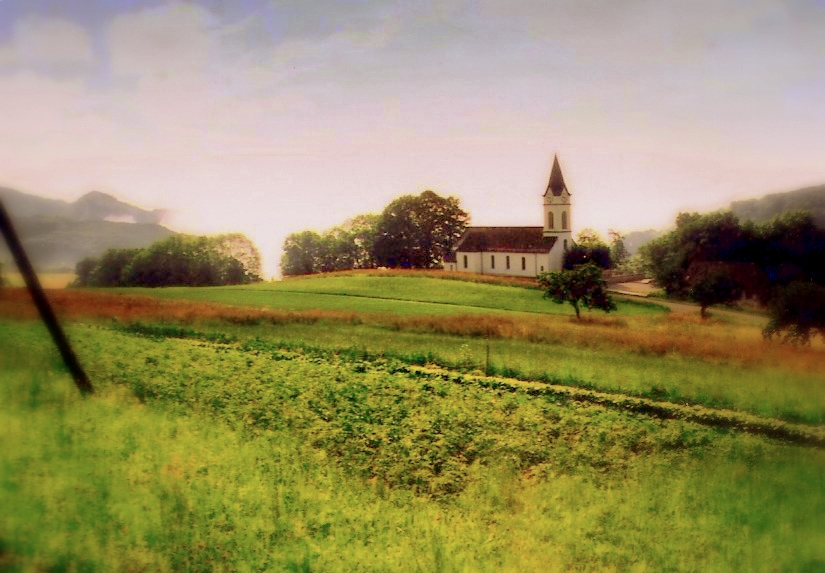 Church in Ifenthal, Ifenthal-Hauenstein SO., Switzerland Die Ifenthaler Kirche von Westen gesehen. Selbstfotografiert 2000 Dominik Hundhammer, Image by myself Dominik Hundhammer uploaded to commons Zerohund 02:40, 7 November 2005 (UTC)